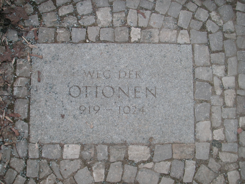 Der Weg der Ottonen Fotografiert am Magdeburger Domplatz.